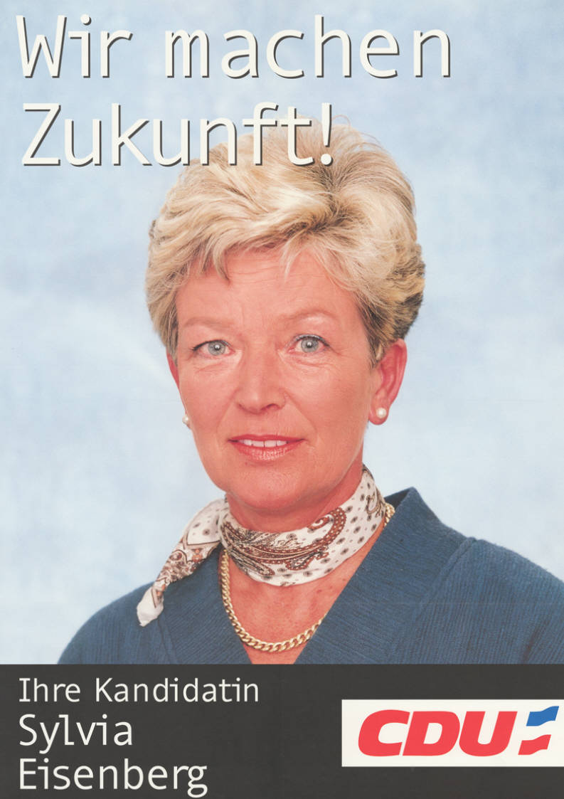 Wir machen Zukunft! Ihre Kandidatin Sylvia Eisenberg CDUAbbildung:PorträtfotoPlakatart:Kandidaten-/Personenplakat mit PorträtObjekt-Signatur:10-012 : 1222Bestand:Landtagswahlplakate Schleswig-Holstein (10-012)GliederungBestand10-18:Landtagswahlplakate Schleswig-Holstein (10-012) » CDULizenz:KAS/ACDP 10-012 : 1222 CC-BY-SA 3.0 DE